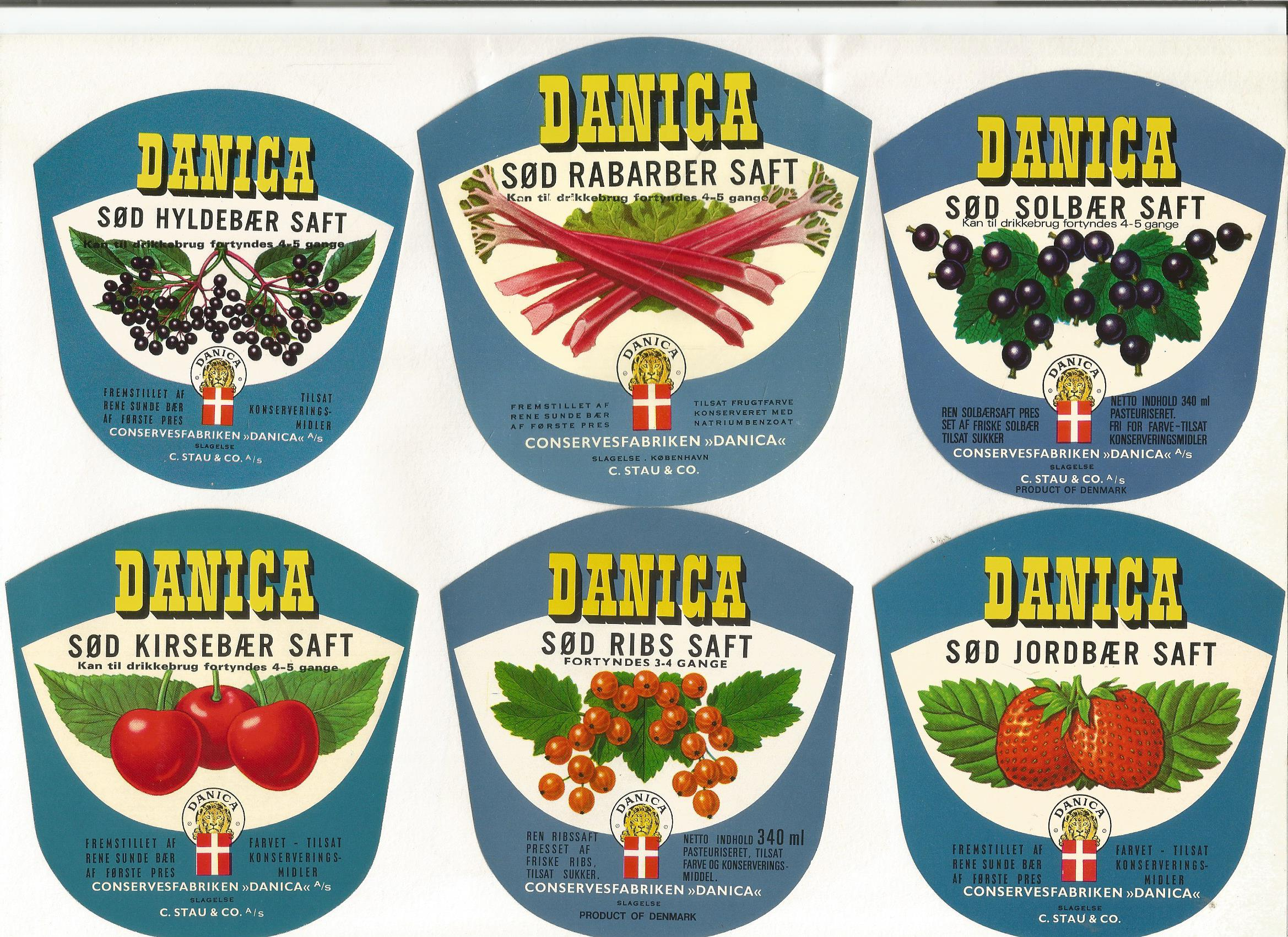 Labels fra Conservesfabrikken Danica